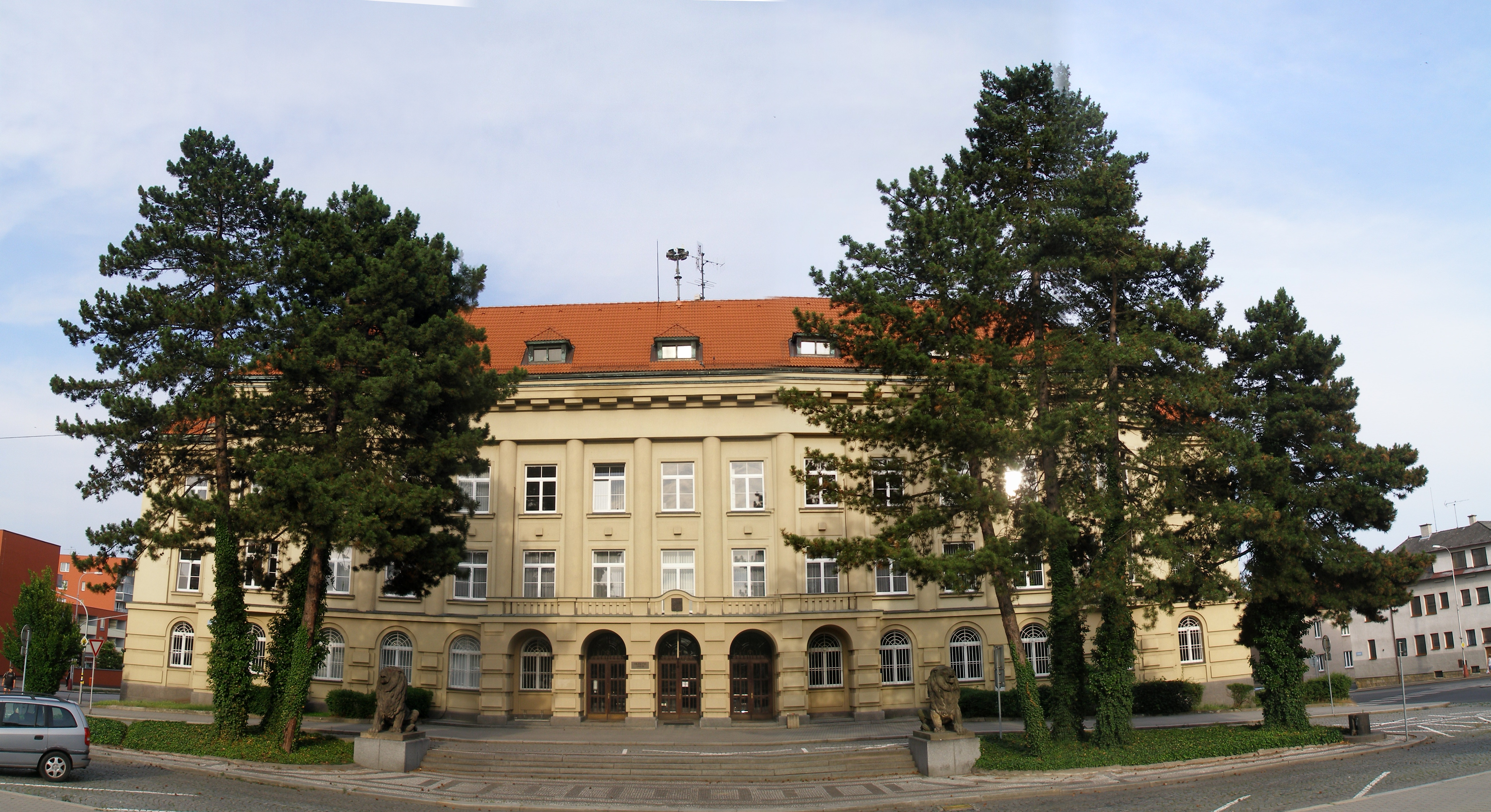 Budova okresního soudu v Mladé Boleslavi.